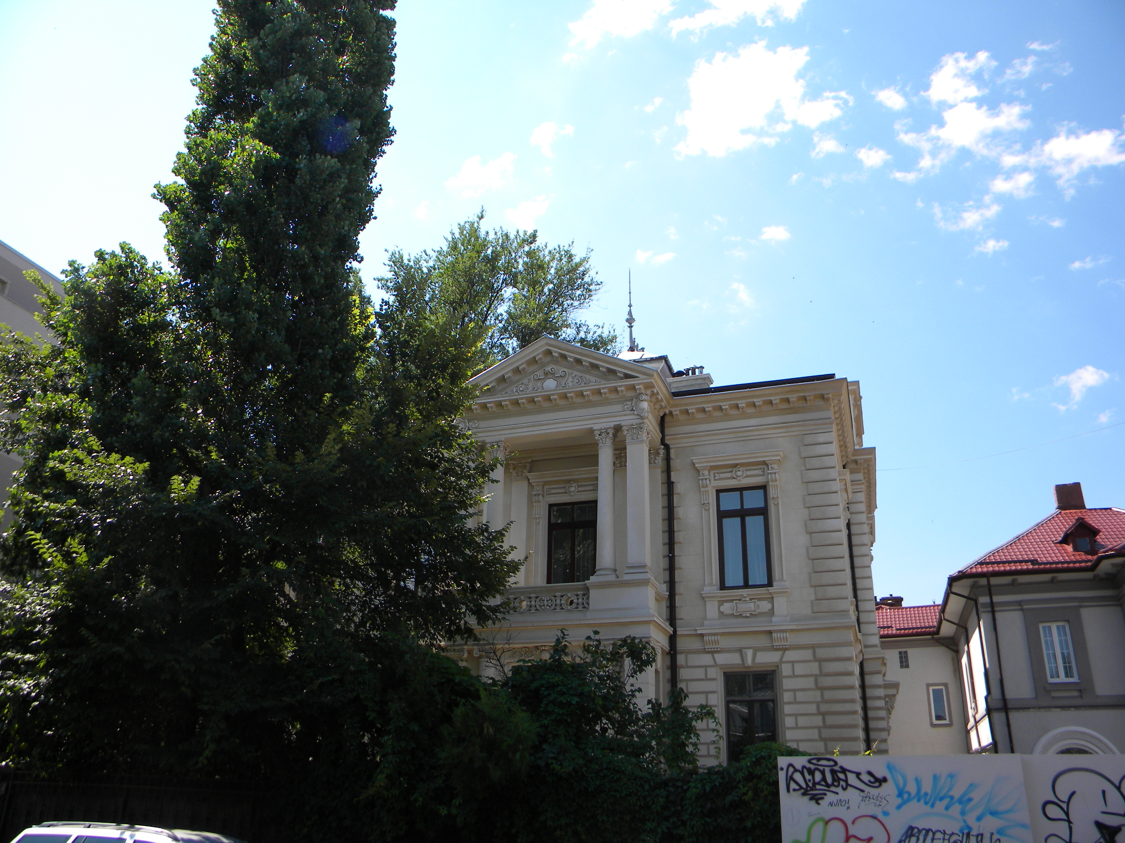 Bucuresti, Romania, Imobil pe Str. Eremia Grigorescu nr. 3; B-II-m-B-20950